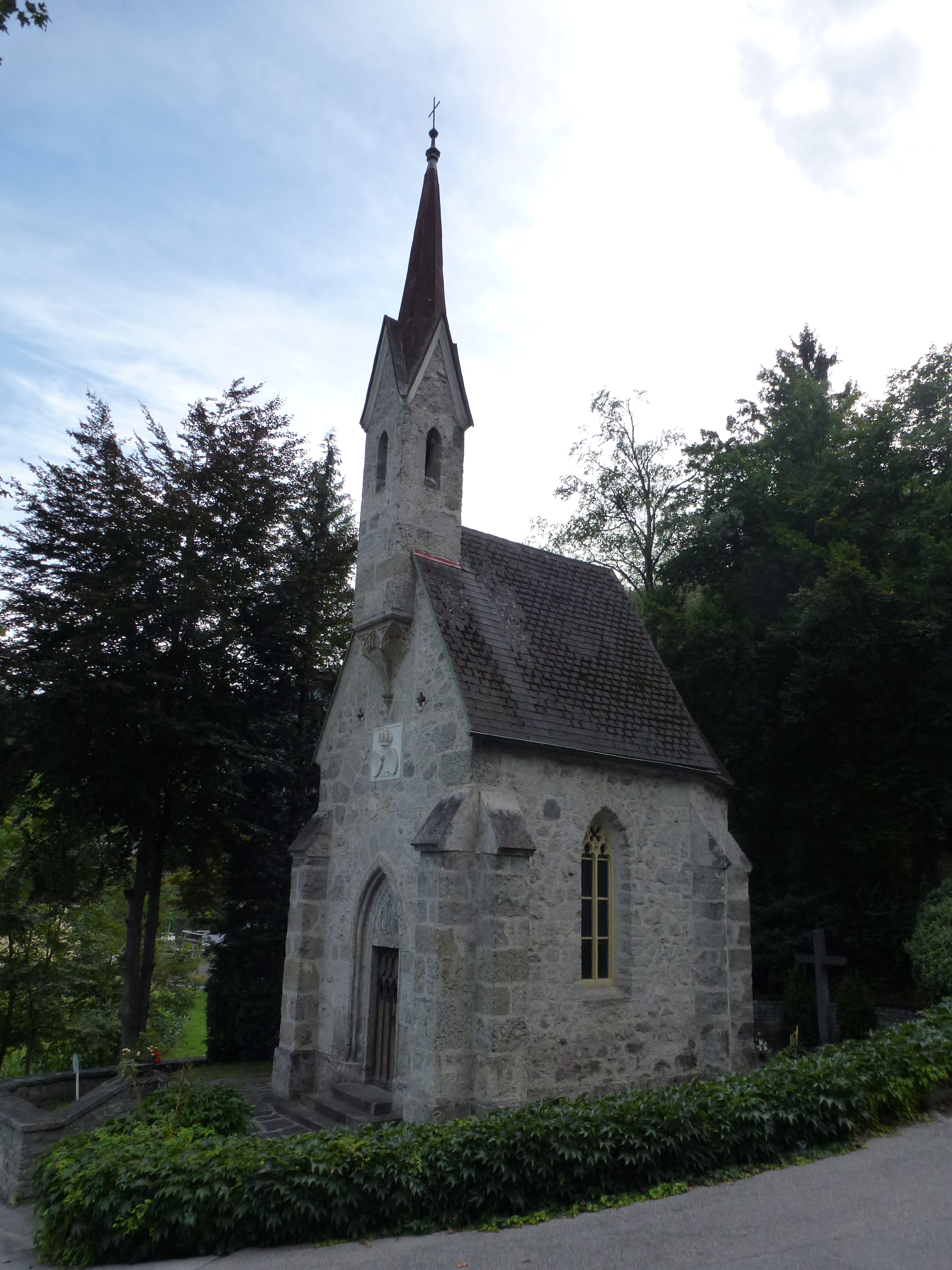 Königskapelle Karrösten This media shows the remarkable cultural object in the Austrian state of Tyrol listed by the Tyrolean Art Cadastre with the ID 20044. (on tirisMaps, pdf, more images on Commons, Wikidata)